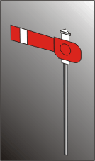 Segnali Ferroviari